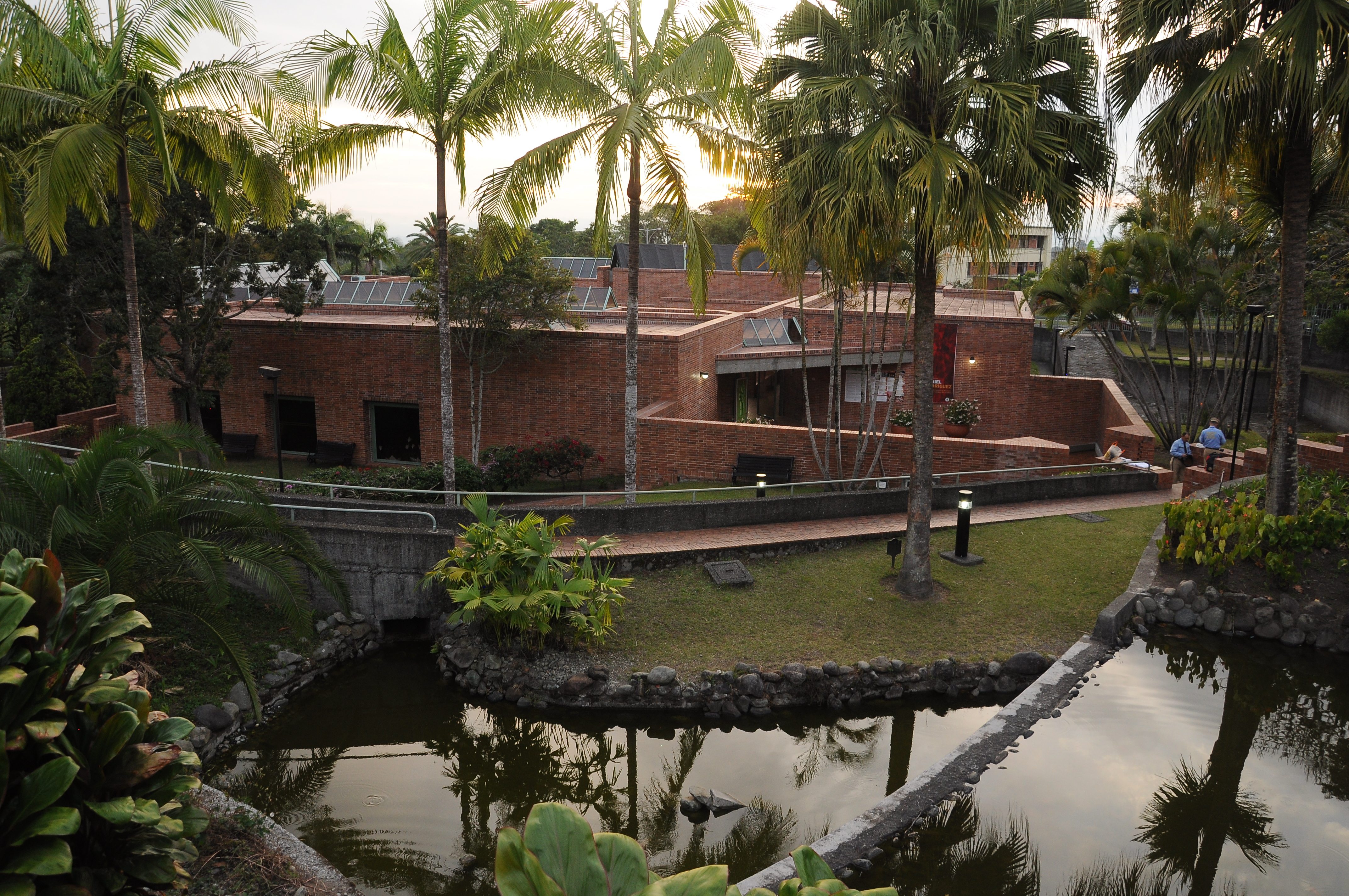 Carretera Nacional norte de Armenia